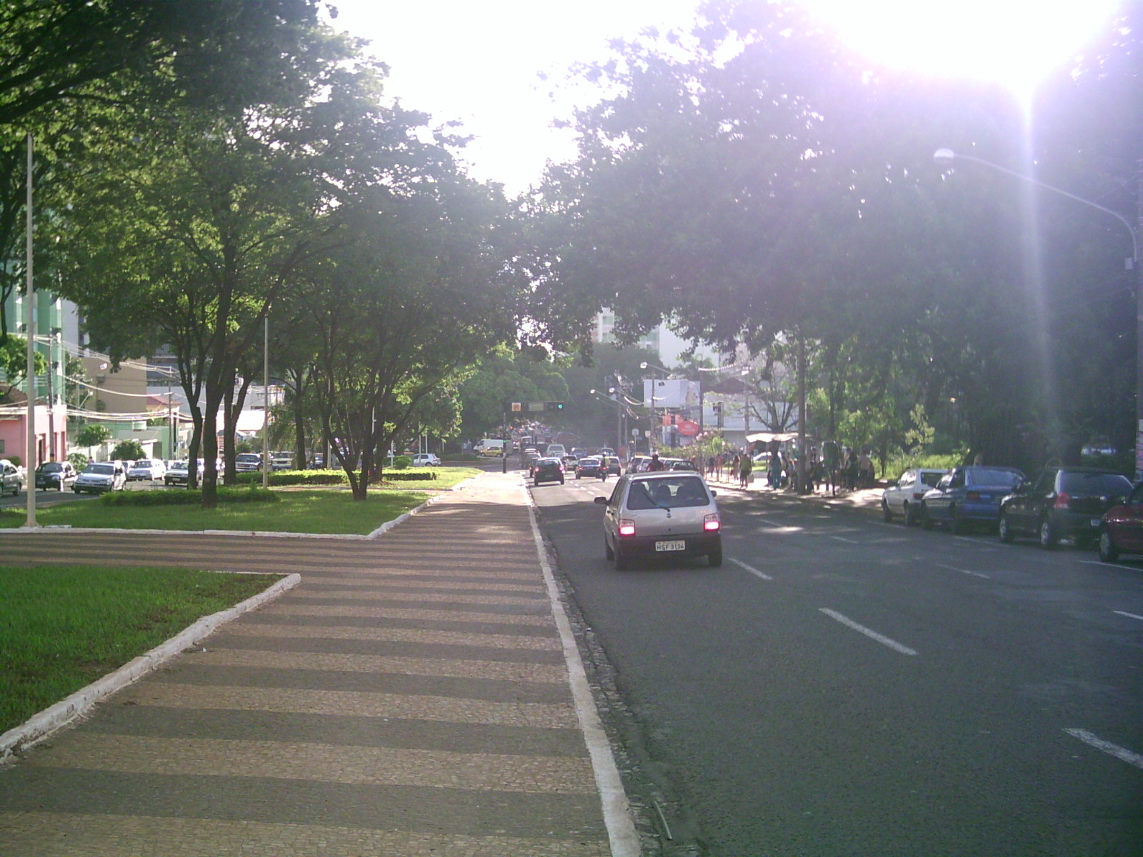 Foto da Av. Afonso Pena - Campo Grande